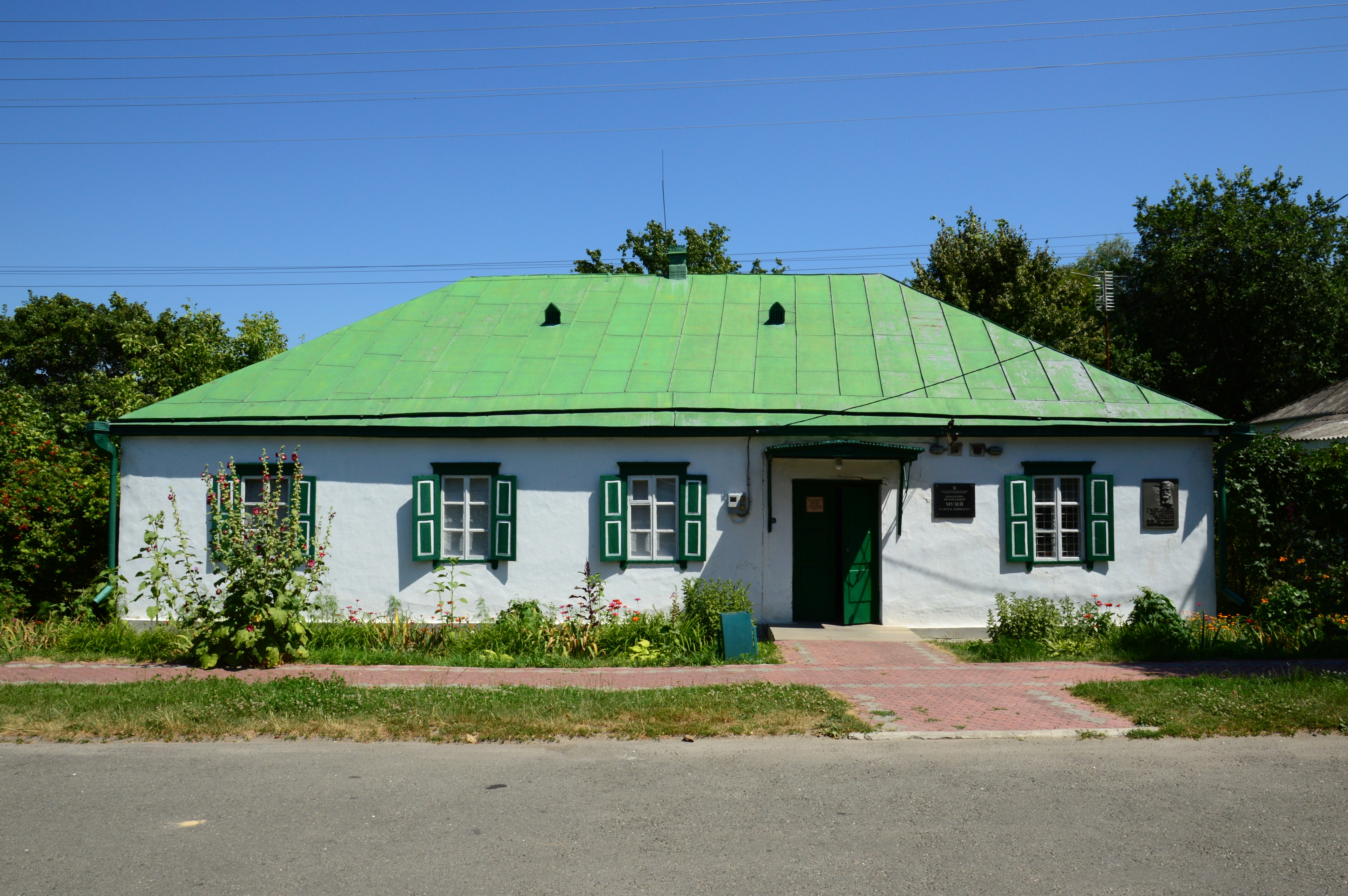 Музей І. Нечуя-Левицького у Стеблеві.